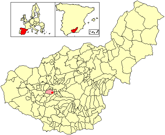 Situación de la localidad de Gabia Chica (en el municipio de Las Gabias) respecto a la provincia de Granada, en España.